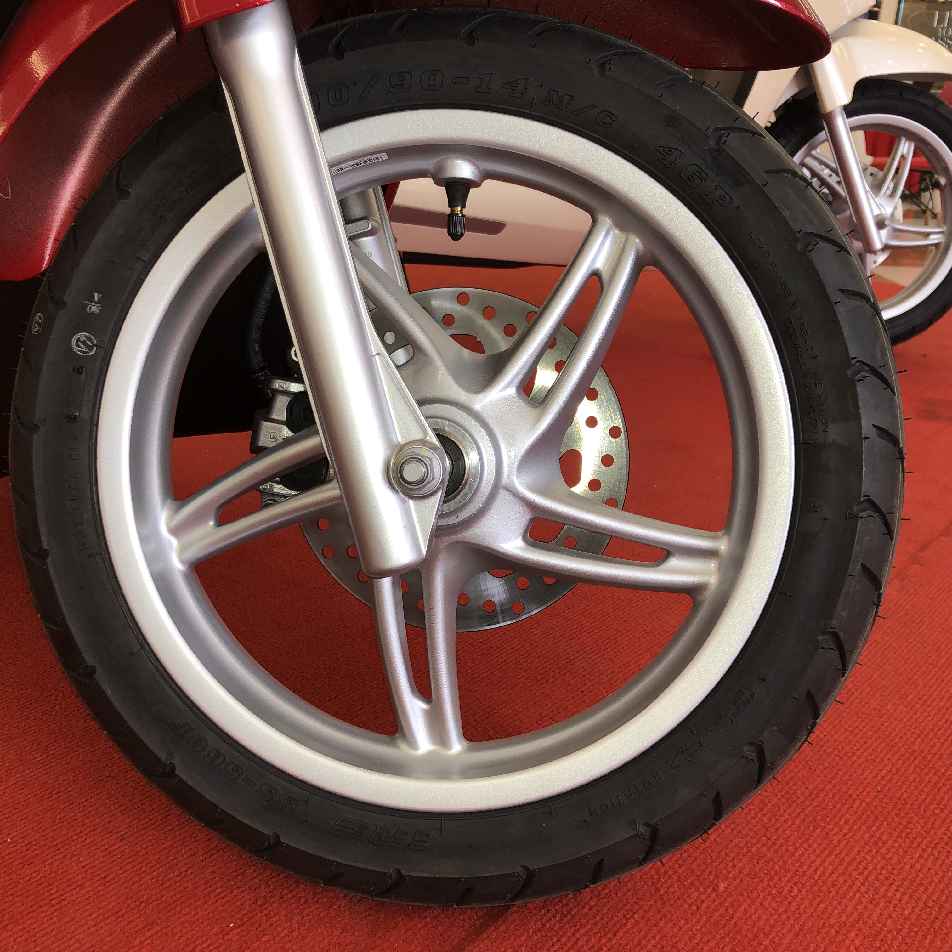 Lốp xe IRC cho VinFast Klara tại Vincom Mega Mall Times City